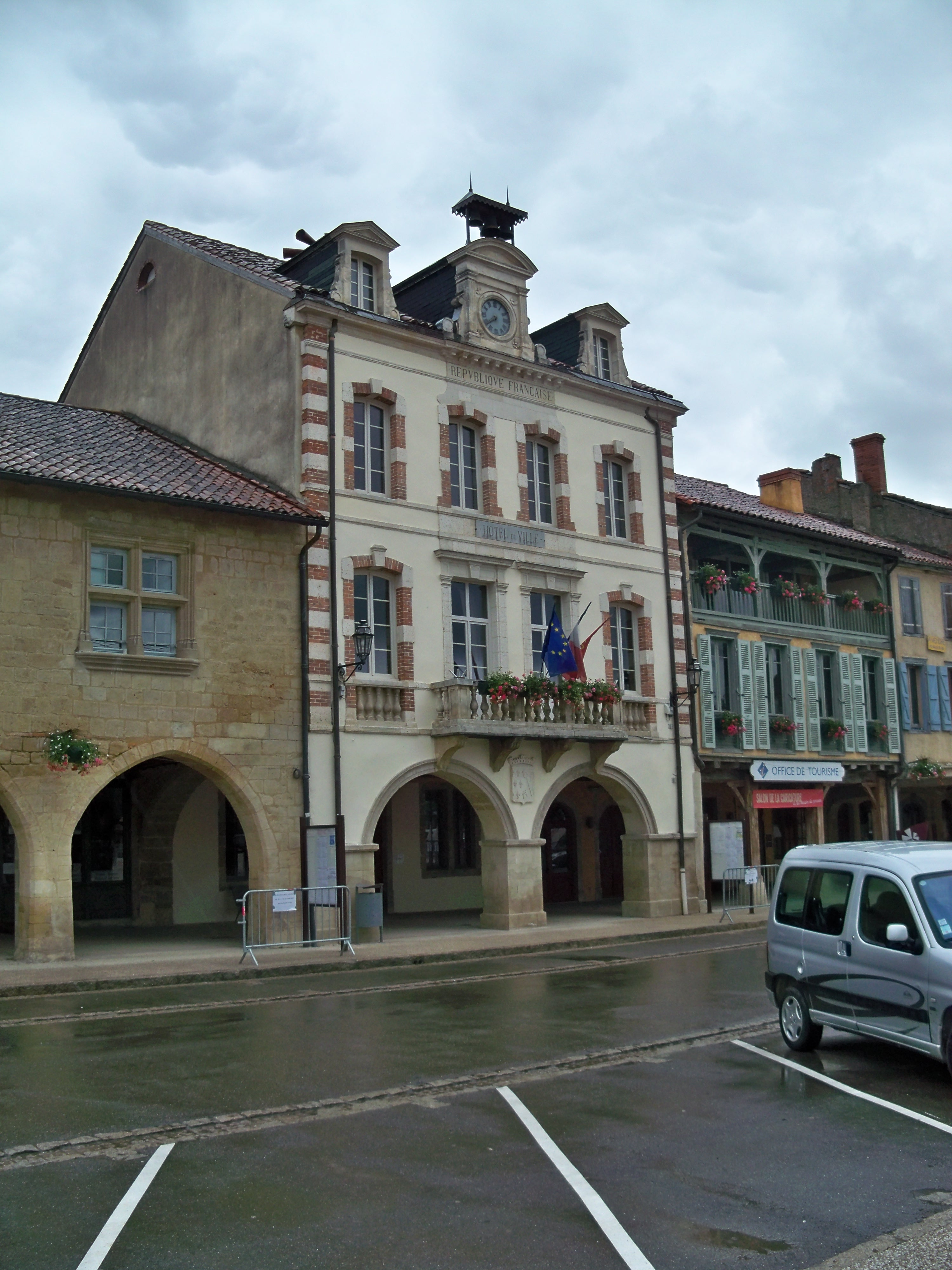 Mairie